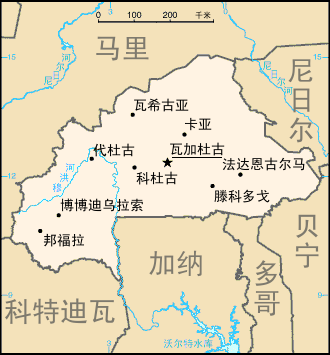 布基纳法索地图。